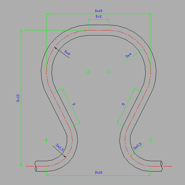 Dilatatore Omega